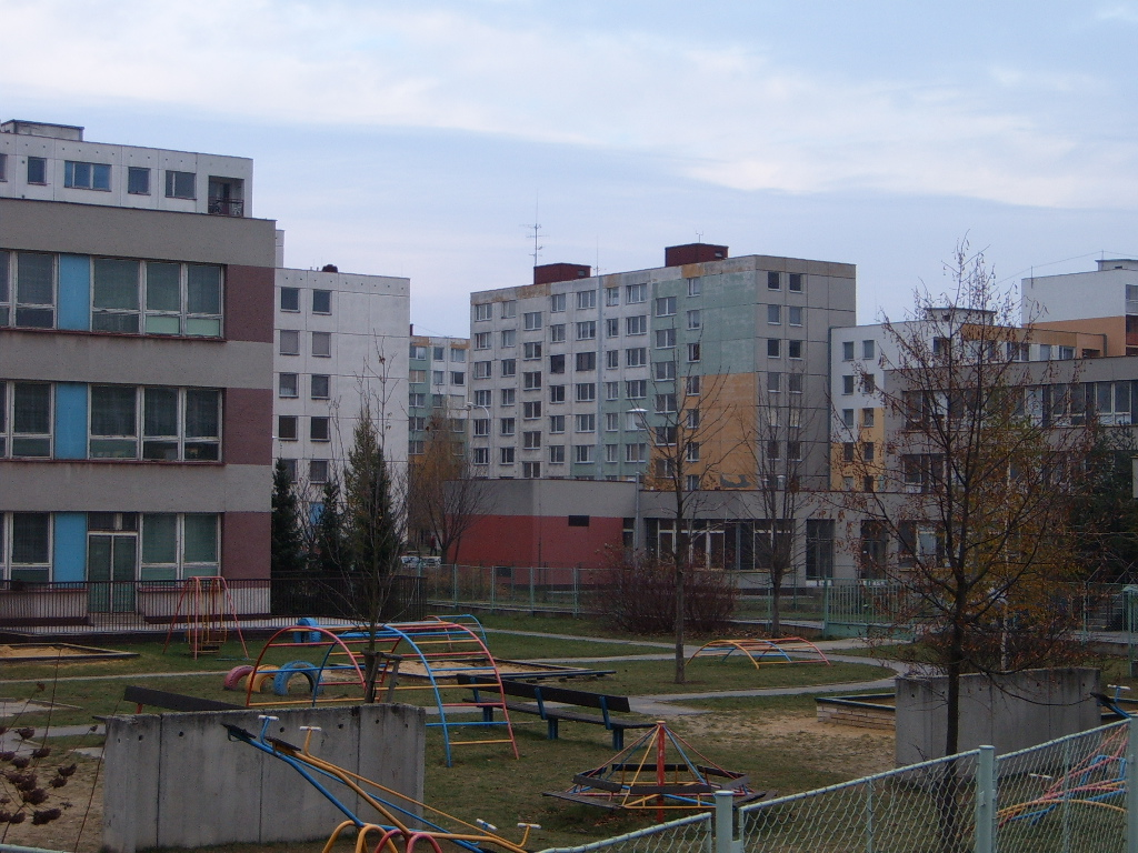 v nitru sídliště Bělský les